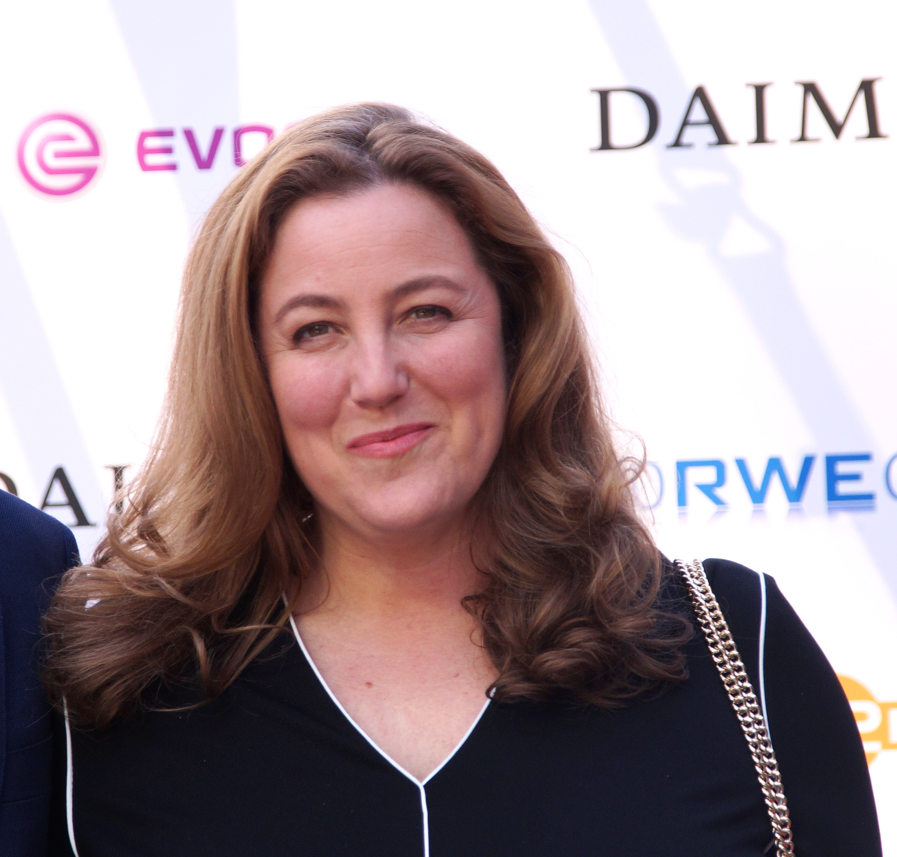 Jörg Winger und Anna Winger bei der Verleihung des 'Grimme Preis 2016' am 08.04.2016 in Marl.